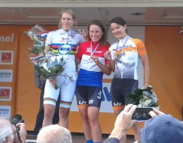 1) Annemiek van Vleuten2) Ellen van Dijk3) Marianne Vos